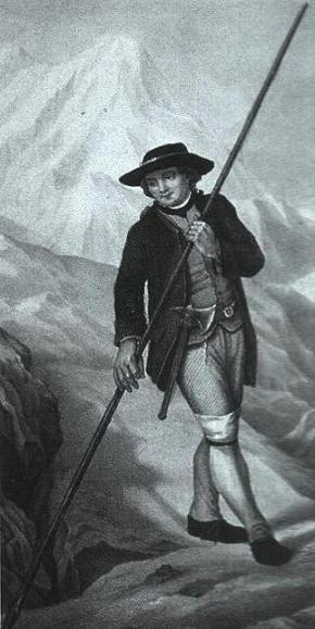 Репродукция с картины Вебера, изображающая горного проводника, первовосходителя на Монблан Жака Бальма